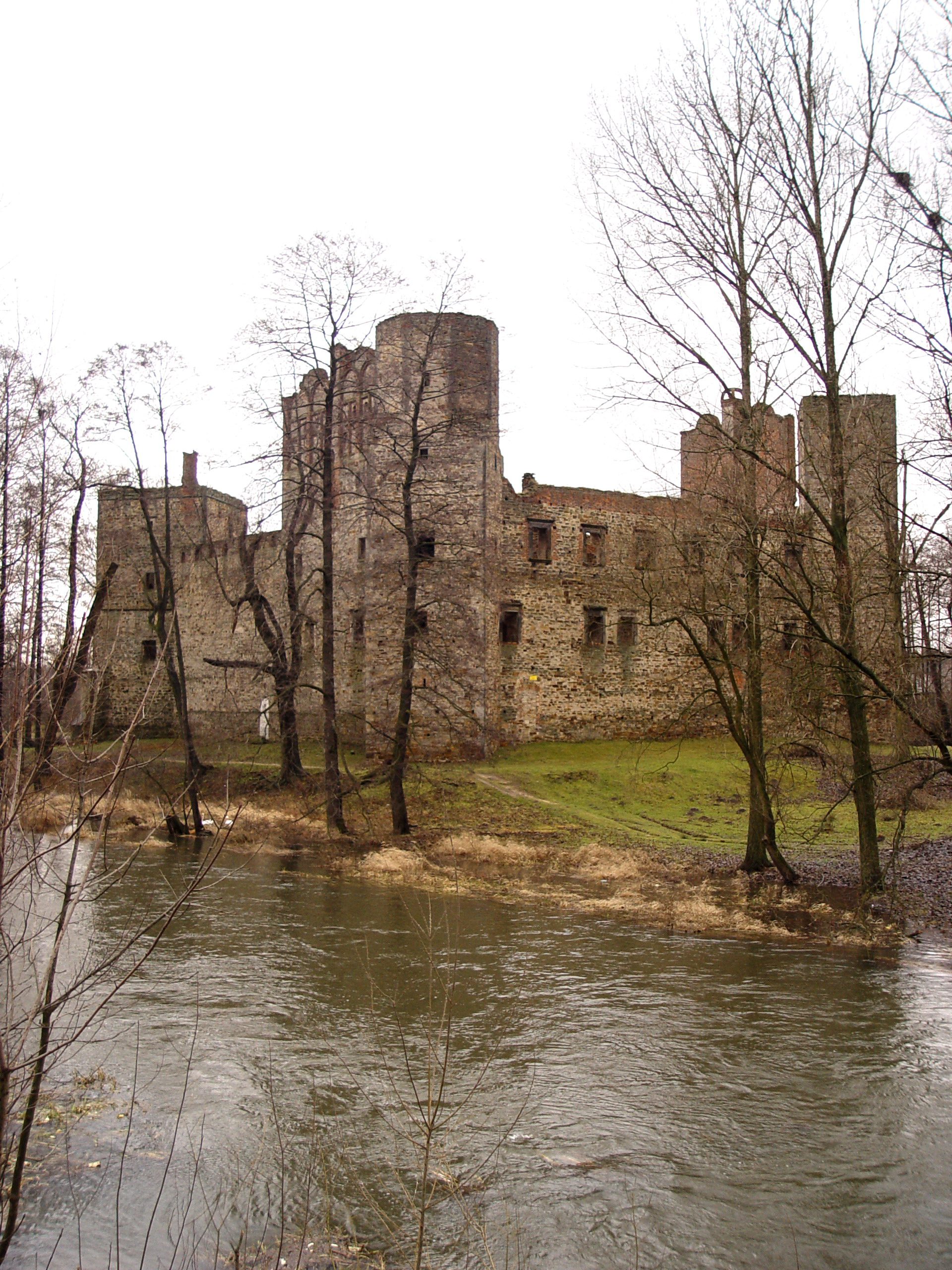 Zamek w Drzewicy,nad rzeką Drzewiczką, widok z mostu, od strony zachodniej